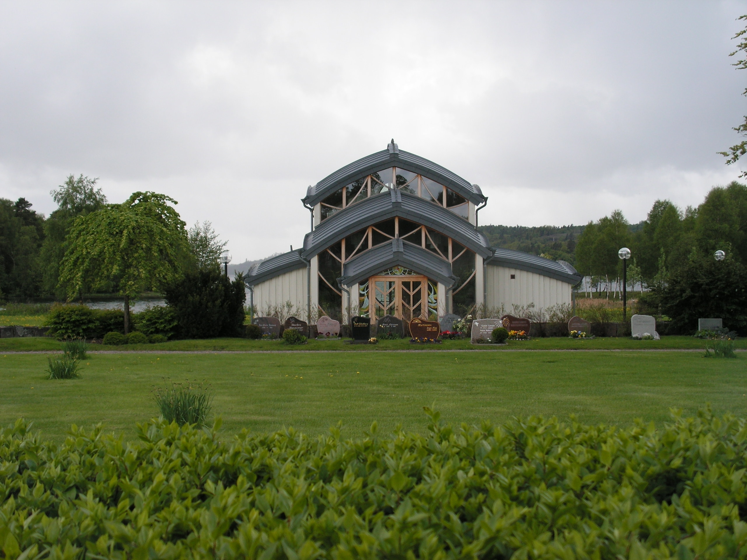 Landvetters nybyggda kapell.